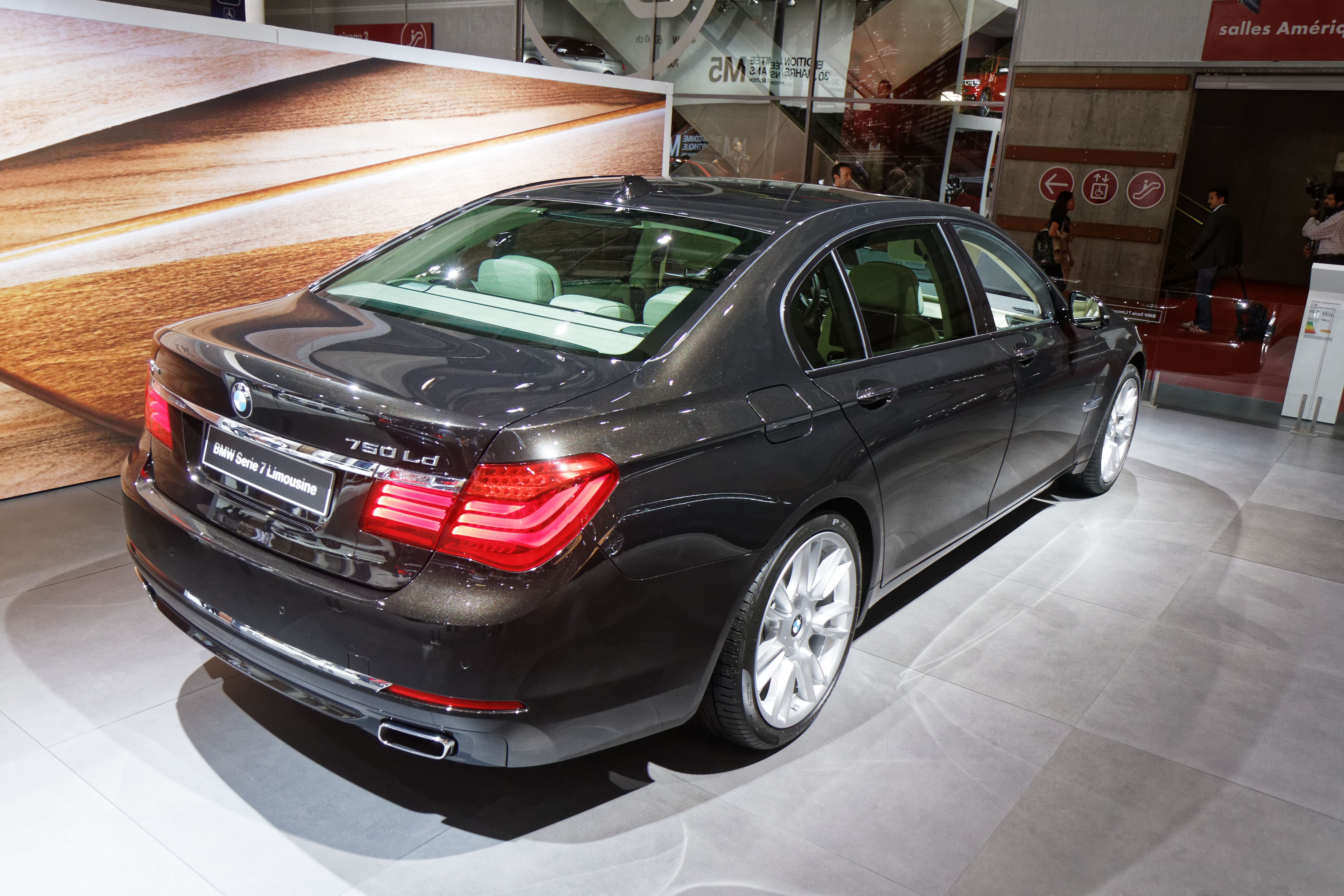 Une BMW Serie 7 Limousine présentée lors du mondial de l'automobile de Paris 2014.